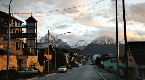 Ushuaia, Feuerland/Argentinien